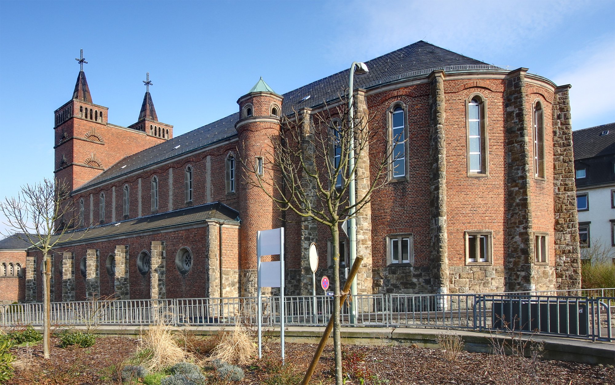 Pallottiner- und Pfarrkirche St. Marien, Limburg an der Lahn. Grundsteinlegung 18. Juli 1926, Weihe 2. Oktober 1927